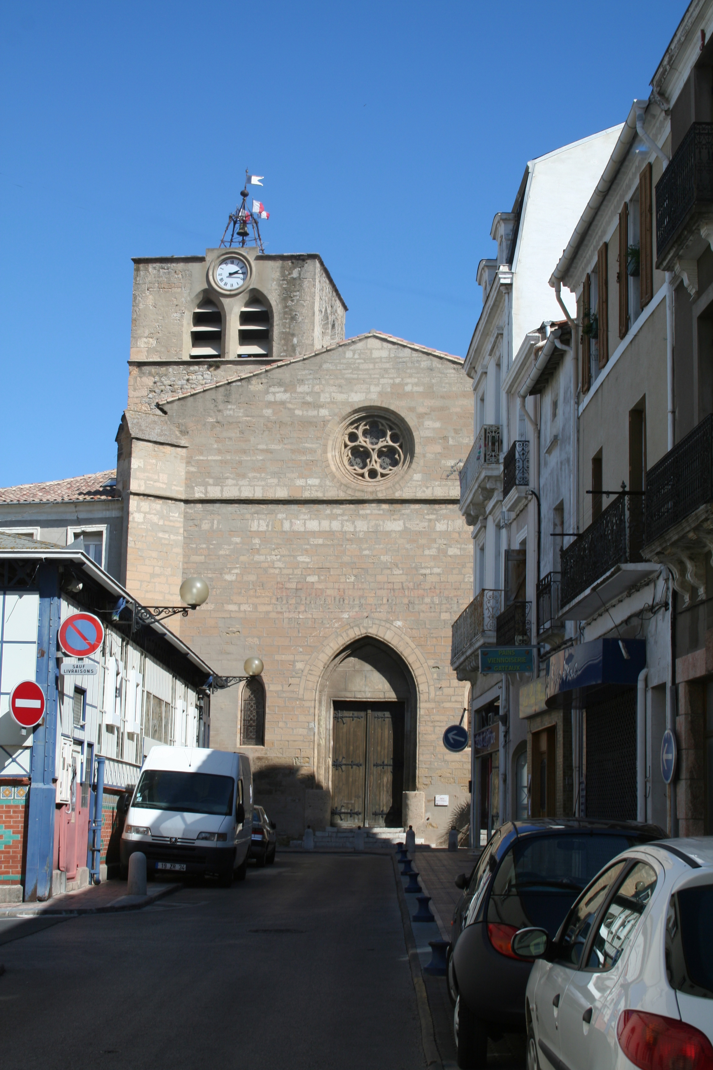 Mèze (Hérault) - façade de l'église Saint-Hilaire.